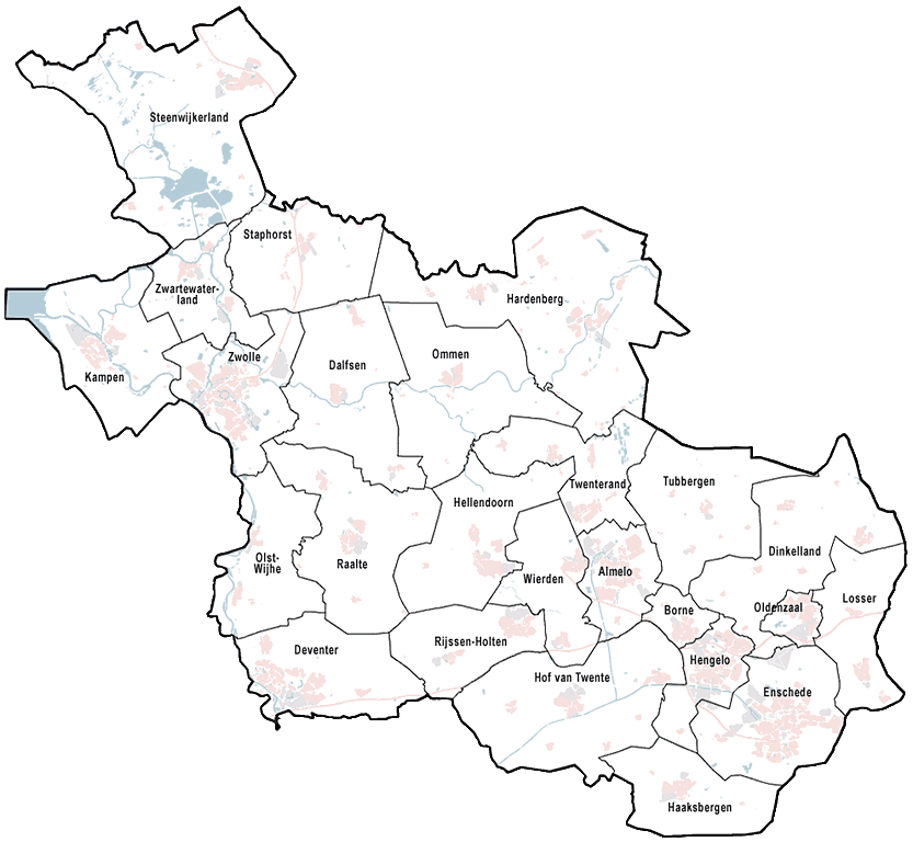 Provincie Overijssel, met indeling van gemeenten (2010). Door Jan-Willem van Aalst, samengesteld uit publiek beschikbare geo-data: Referentie-ondergrond (kustlijn, steden, wegen) gerasterd uit de OpenStreet Map OSM. ( Inhoud is beschikbaar onder de Creative Commons Attribution-ShareAlike 3.0 license. Vectorgrenzen van gemeenten en regio's vrij ter beschikking gesteld met dank aan cartografen van brandweerregio's Hollands-Midden en IJsselland; gerasterd in Photoshop. Overige kenmerken op de kaart: eigen tekenwerk van Jan-Willem van Aalst, op basis van gerasterde gemeentegrenzen.